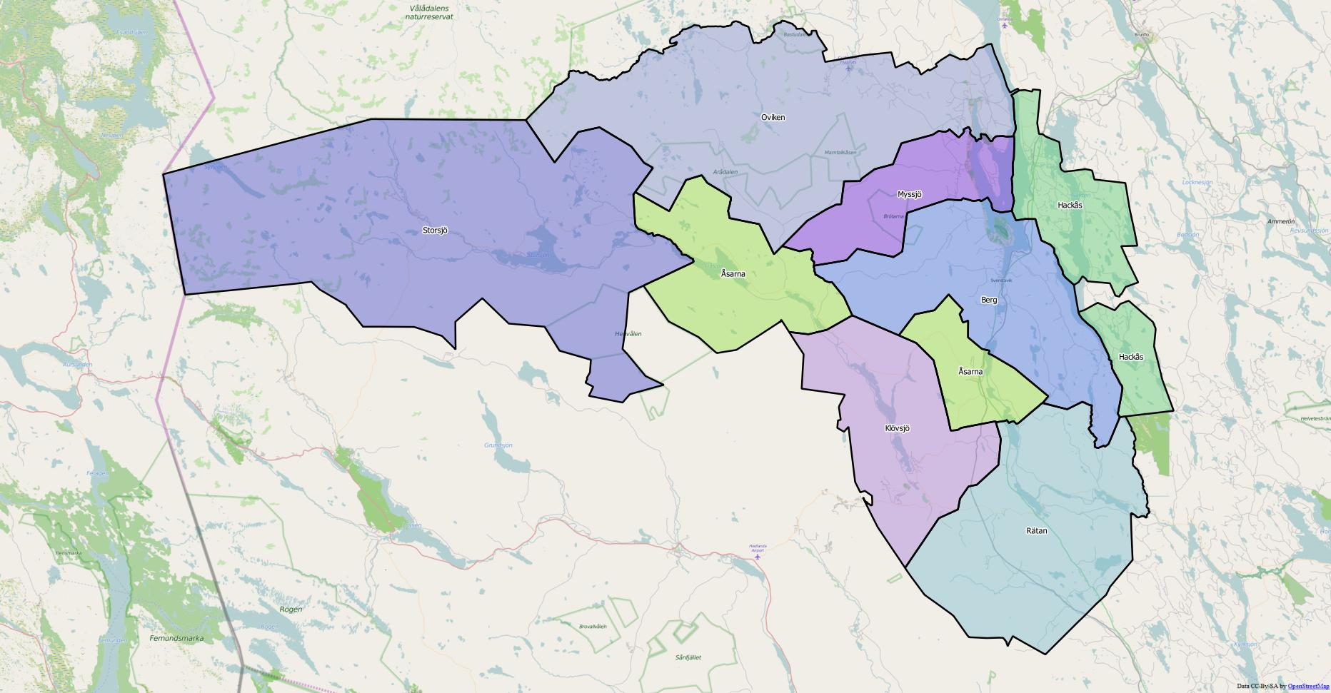 Distriktsindelningen i Bergs kommun